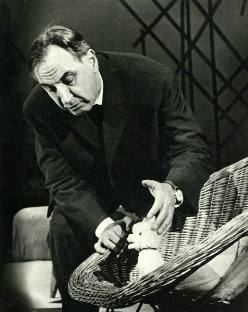 Branko Hofman, Dan in vsi dnevi, Mestno gledališče ljubljansko. Na fotografiji: Vladimir Skrbinšek (Gregor Pehan).